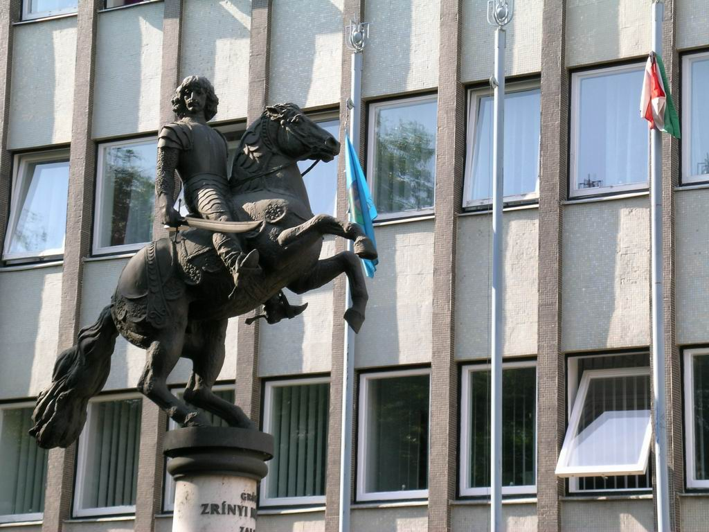 Zrínyi Miklós (1620–1664) lovasszobra Zalaegerszegen. Tóth Béla alkotása (1989)